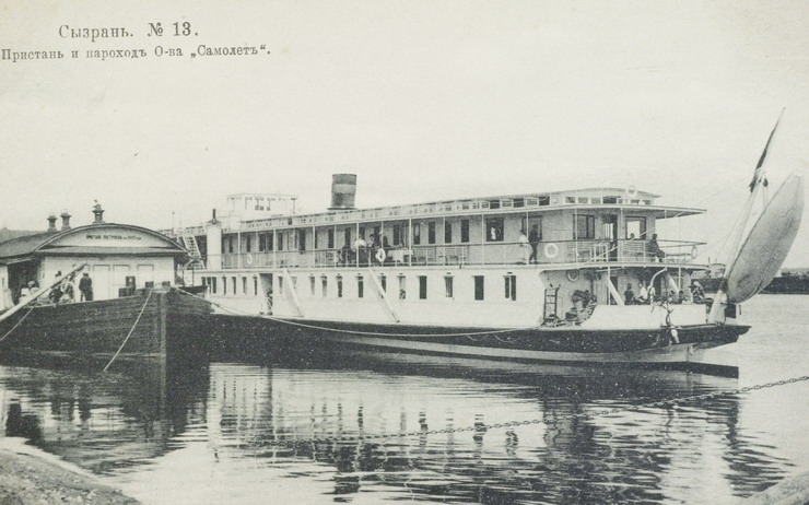 Пристань и пароход общества "Самолет"